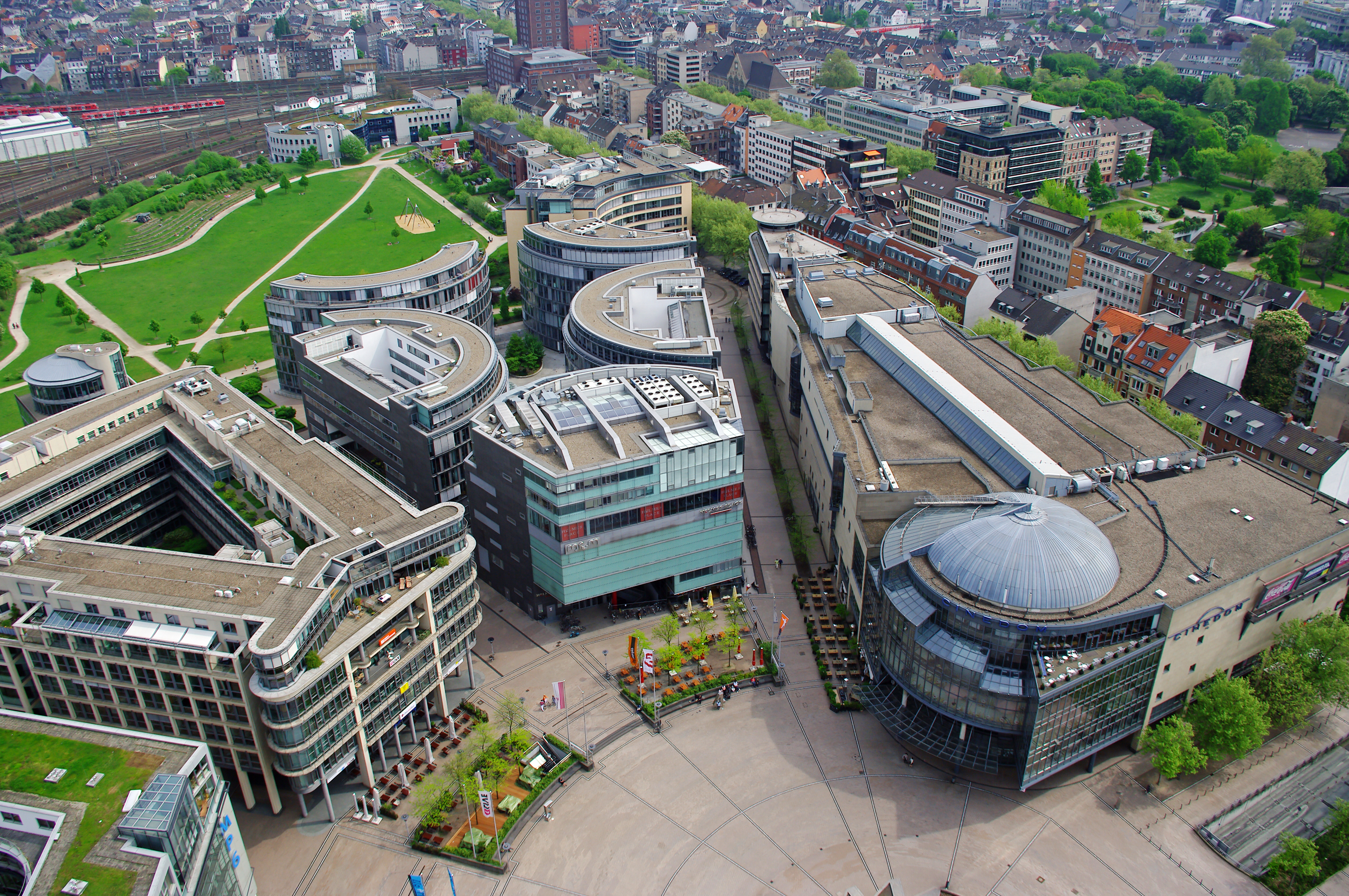 Mediapark aus der Luft. Gebäude: Links: Mediapark 5 Mitte: Mediapark 4 Rechts: Cinedom